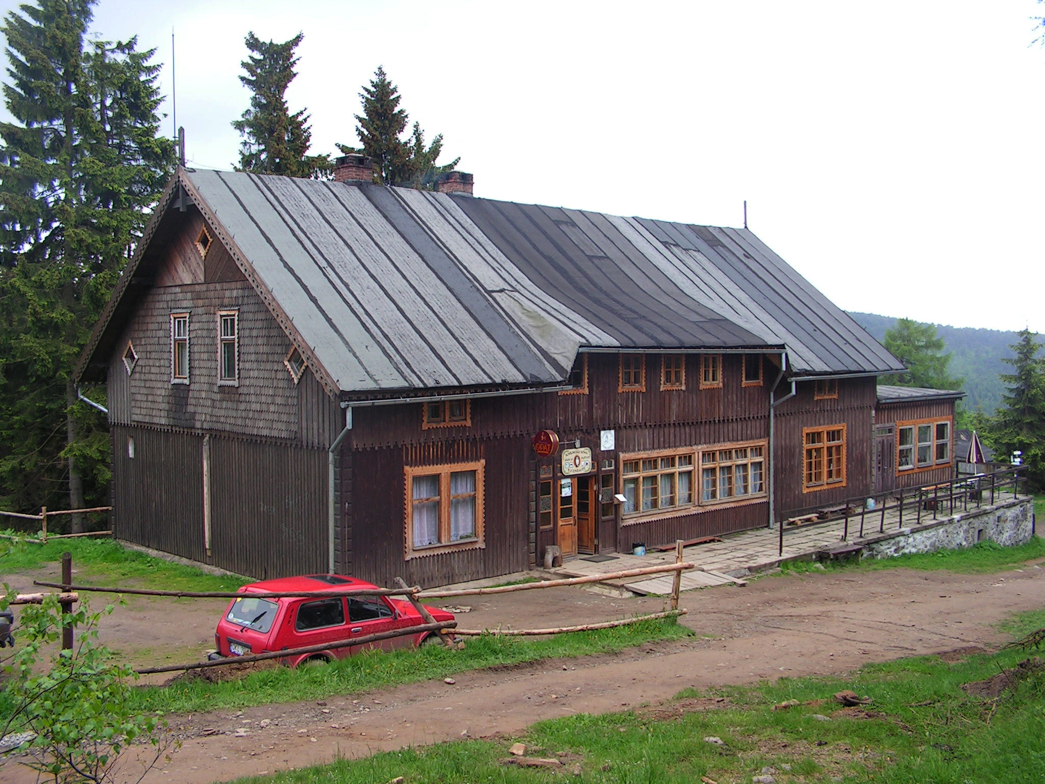 Schronisko Sowa latem